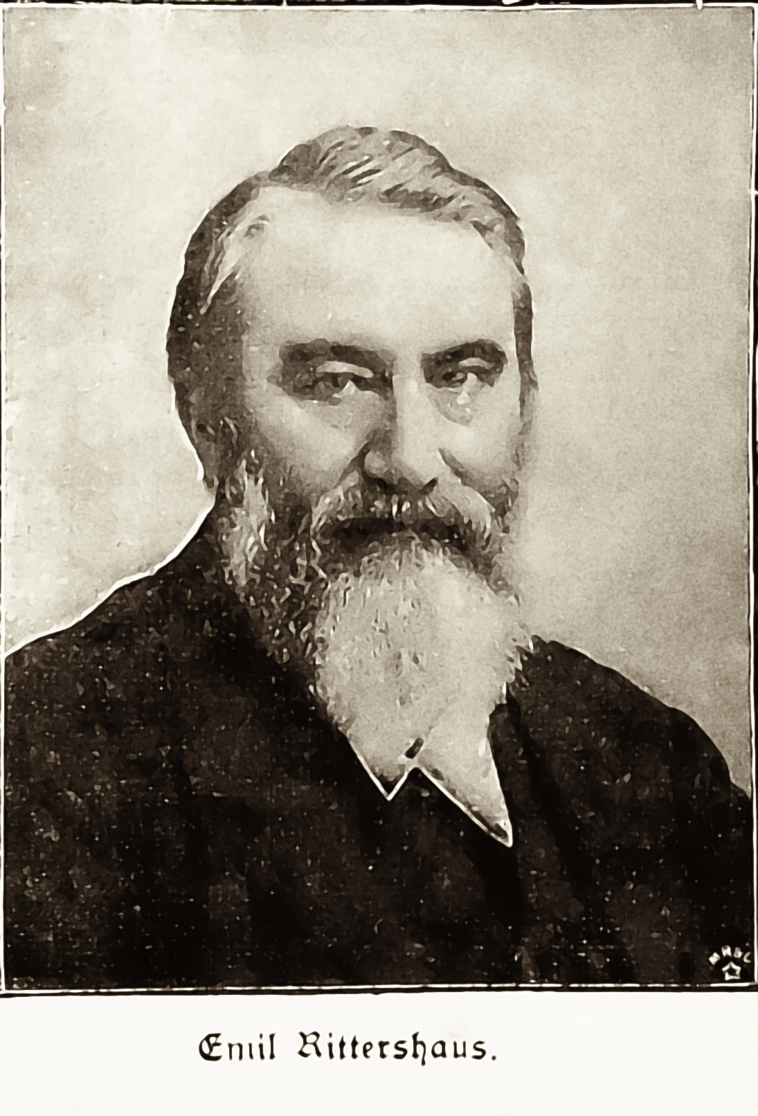 Aus Jaahrbuch der Berliner Morgenzeitung, Kalender 1898, Scan --Goerdten 23:23, 18. Jan. 2007 (CET)